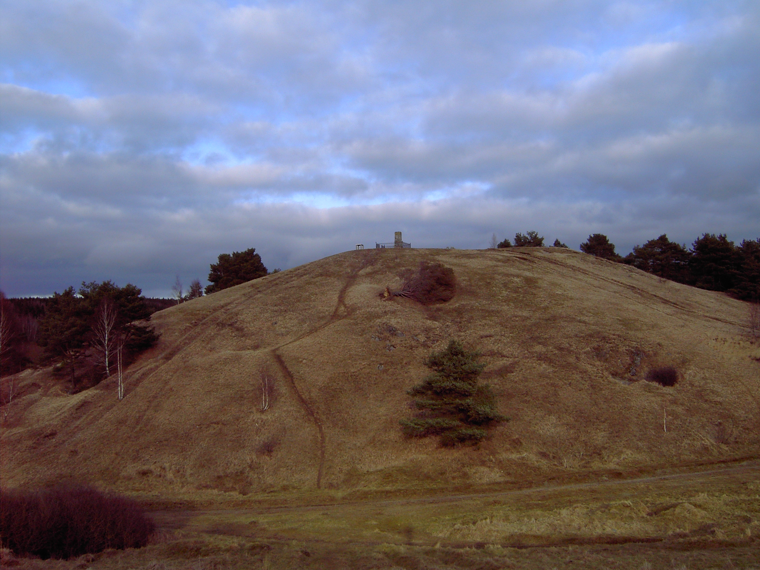 Blick auf den Schlangenberg im Januar